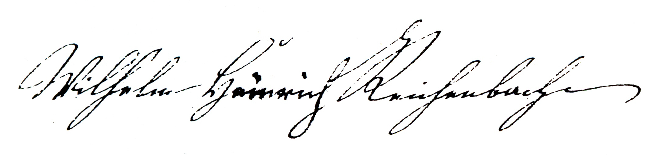 Unterschrift von Wilhelm Heinrich Reichenbach